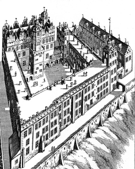 Rycina M. Meriana z 1653 r. przedstawiająca Zamek Książąt Pomorskich w Szczecinie